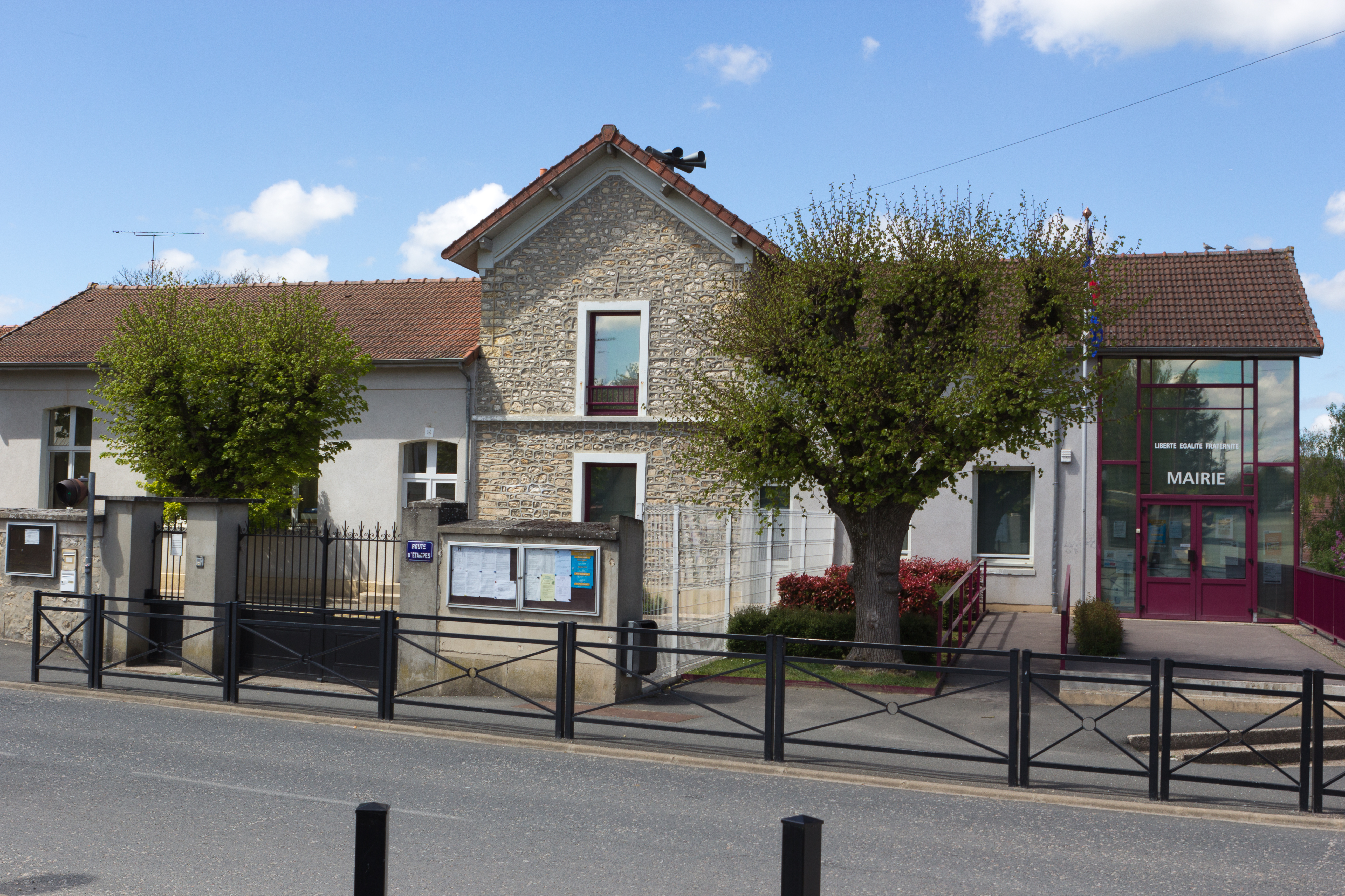 Mairie de D'Huison-Longueville, D'Huison-Longueville, département de l'Essonne, France.